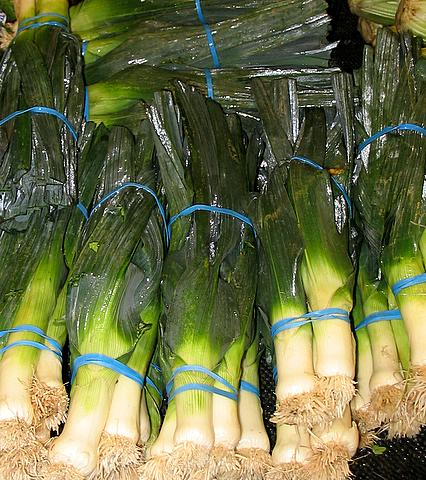 Leeks at Kroger.